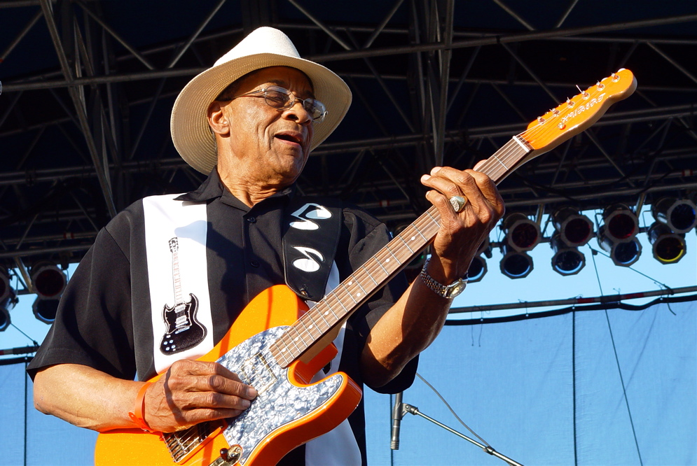 jazzfest 2006 • sioux falls, south dakota • usa